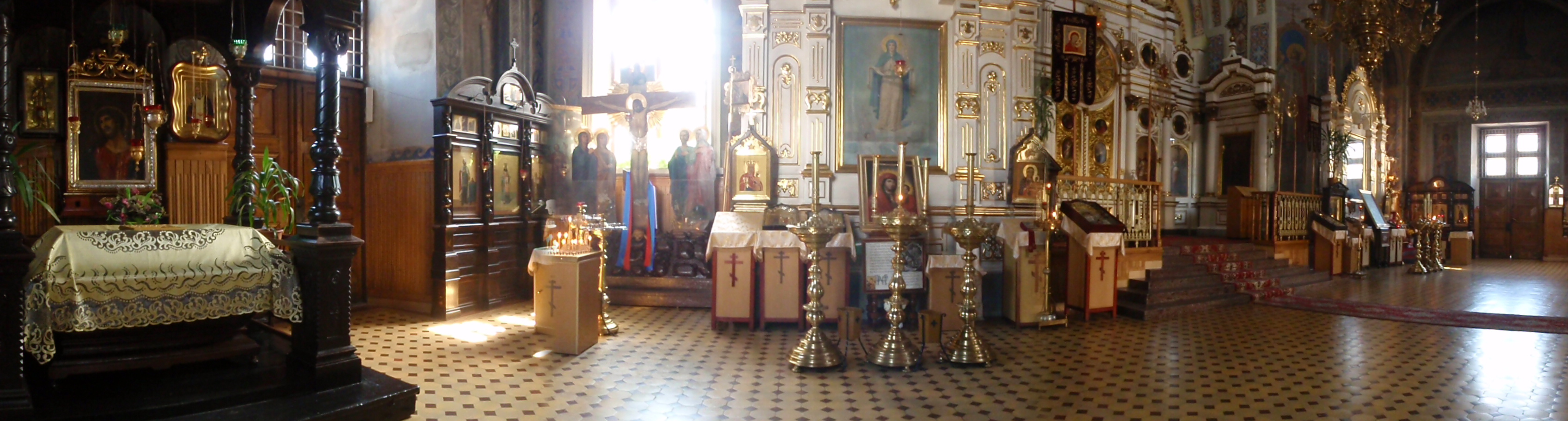 Wystrój-wnętrze Soboru św. Mikołaja